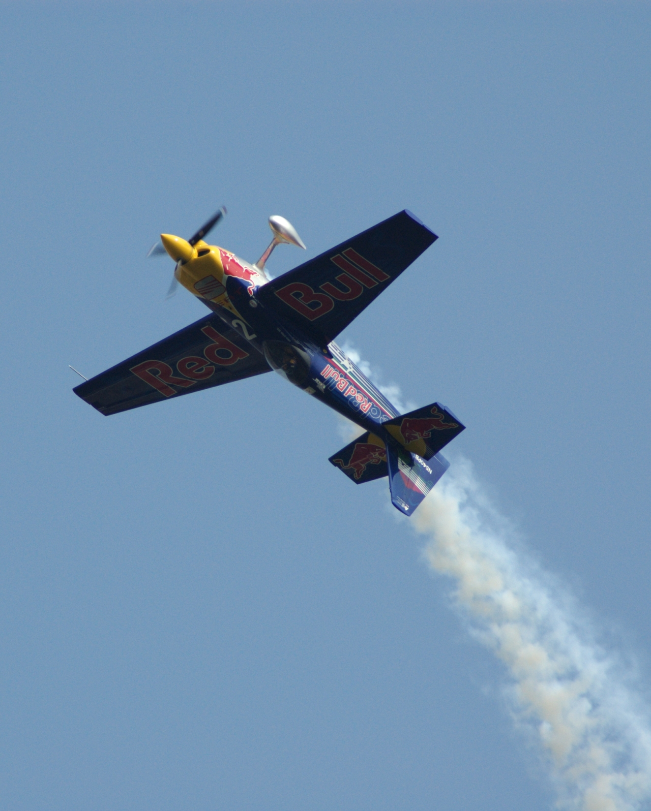 Besenyei Péter és gépe szokásos nézőpontból (Budapest, Air Race)